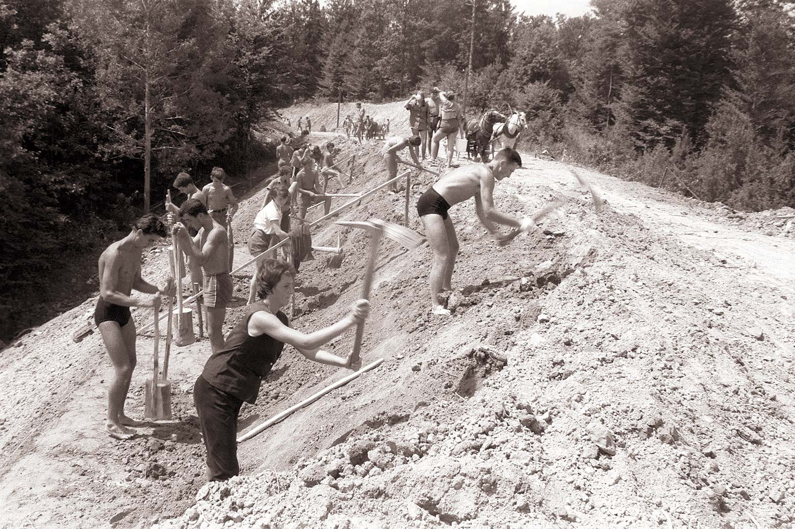 Rekonstrukcija stare ceste pri Lenartu v Slovenskih goricah in pri Benediktu.